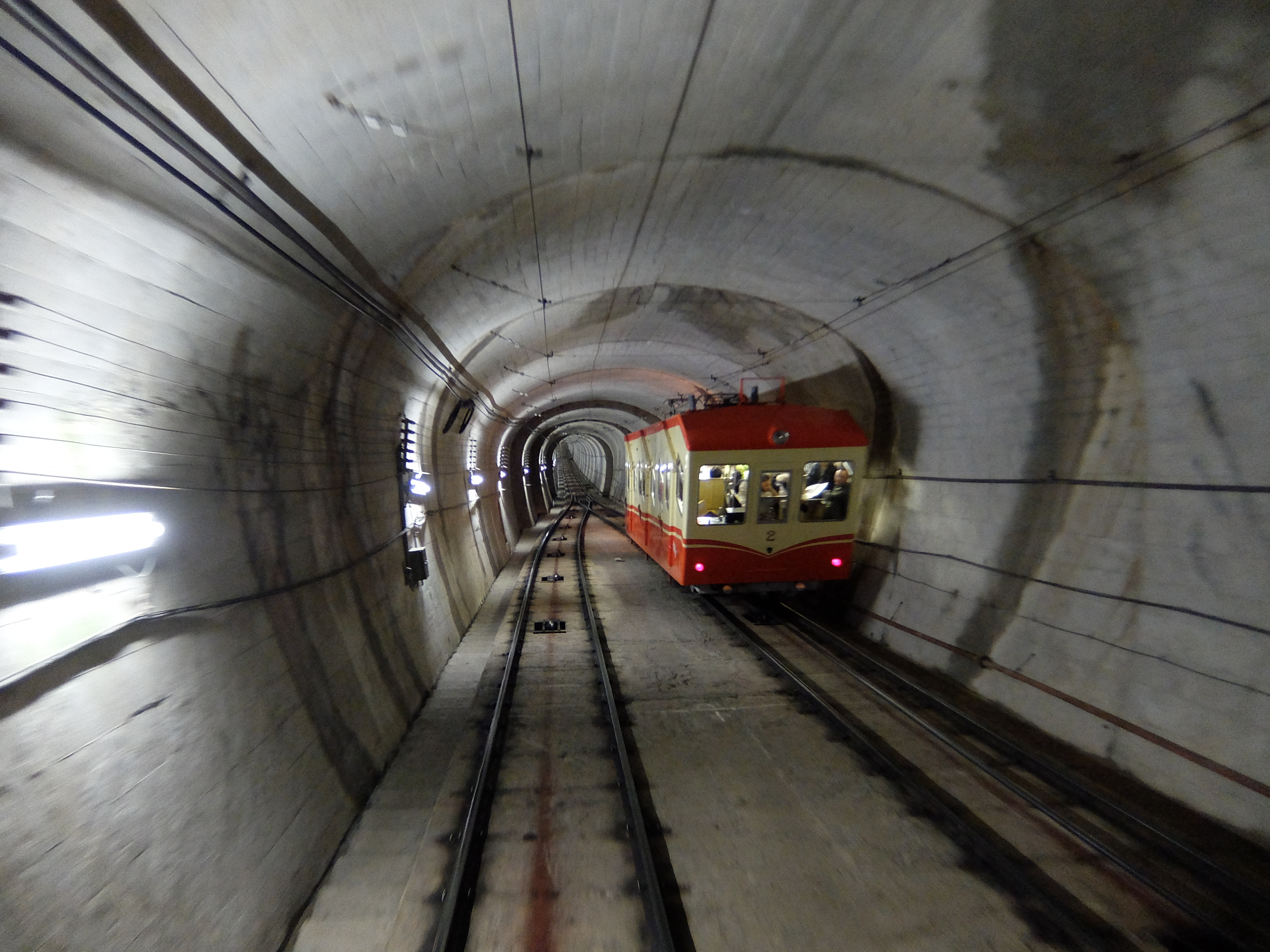 立山黒部貫光鋼索線 交換設備